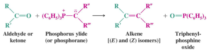 Aldehido mota baten erreakzioa